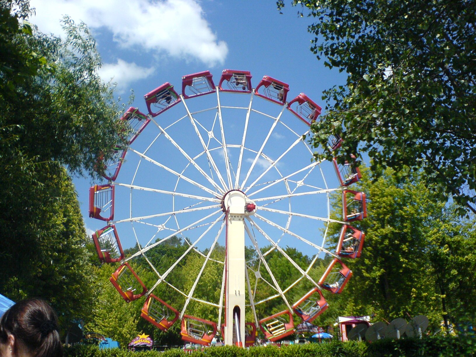 Geisélwind 07